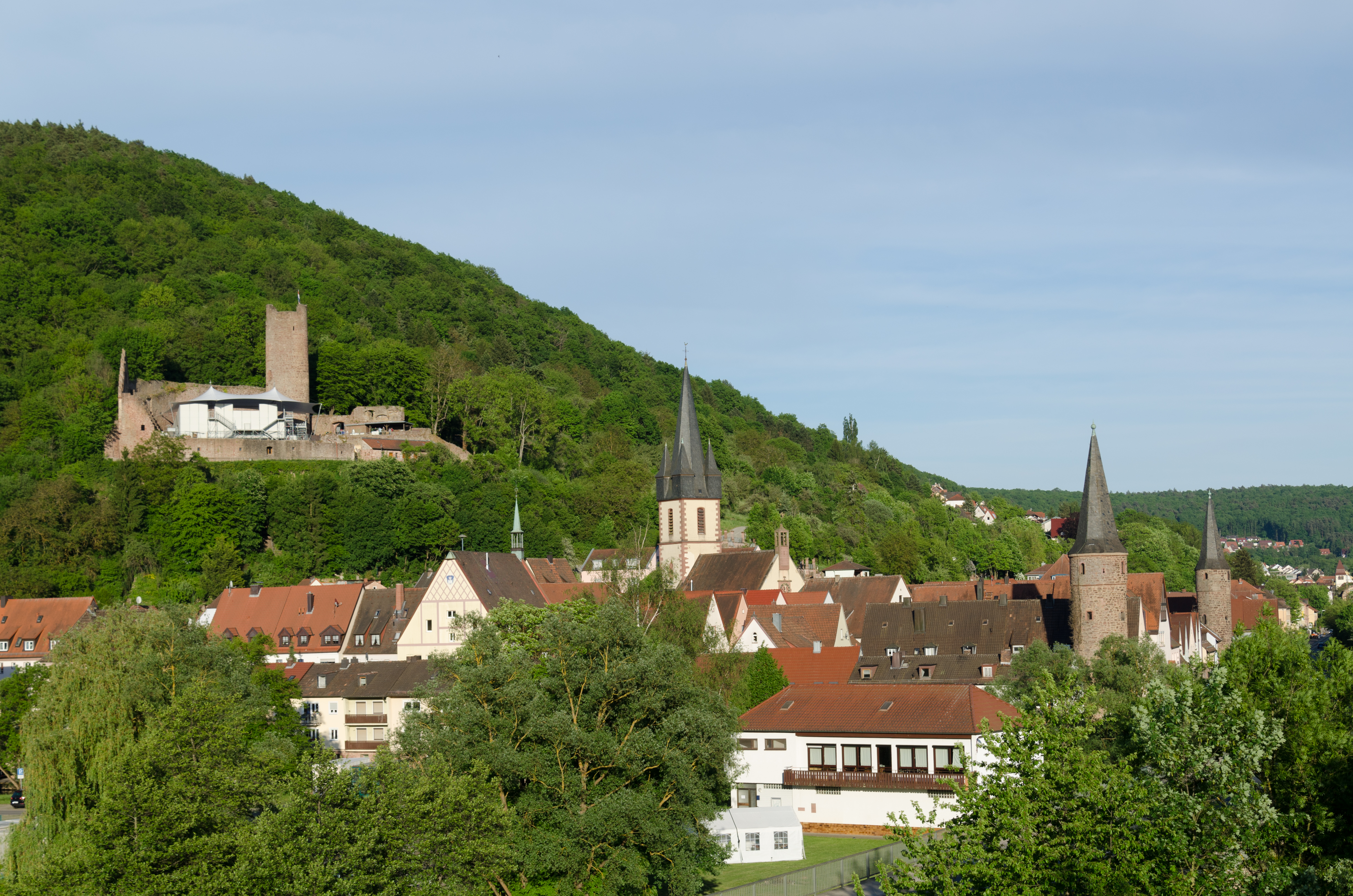 Gemünden am Main, Stadtansicht von Norden